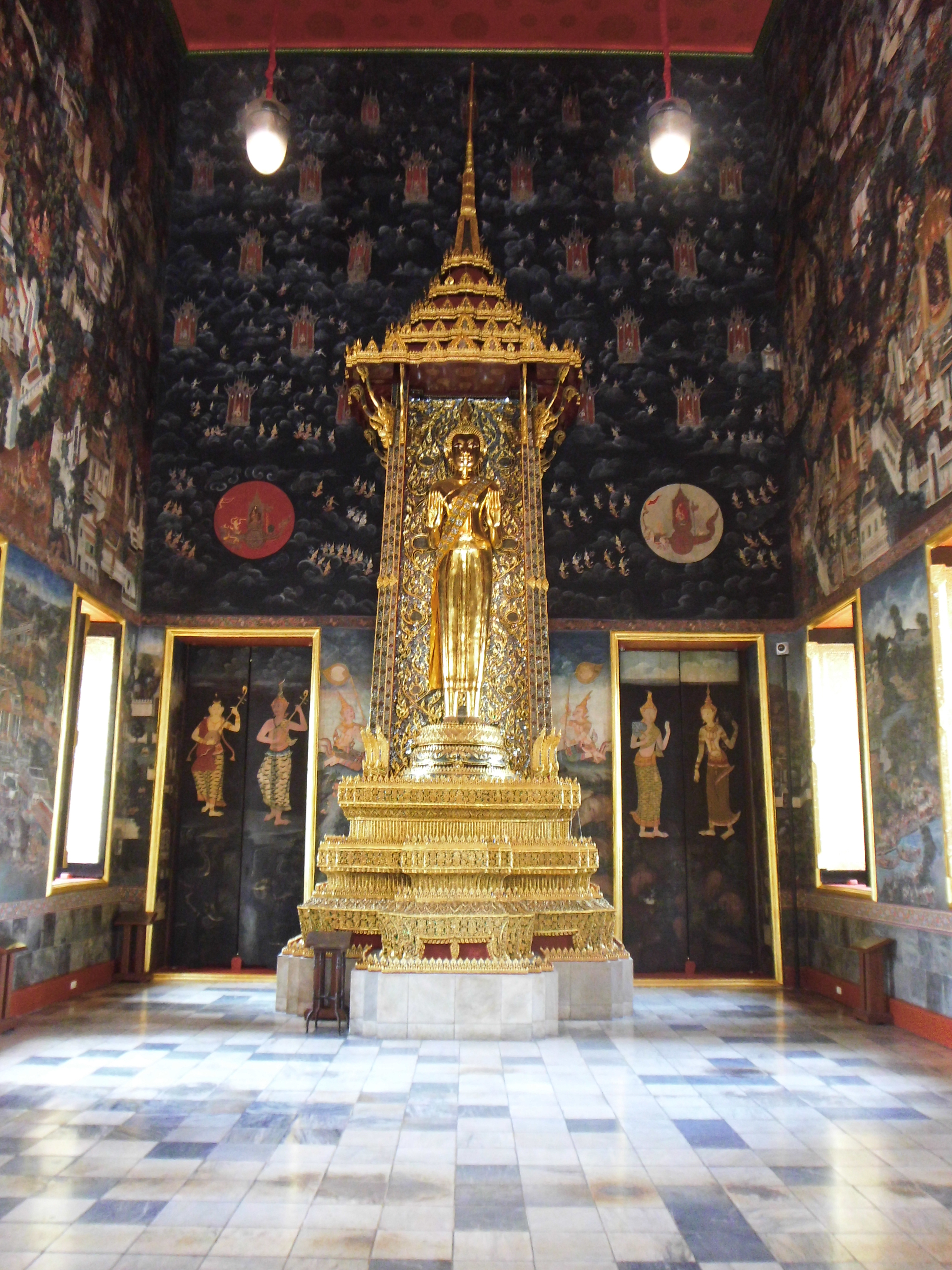 พระราชวังบวรสถานมงคลและกำแพงพระราชวังบวรสถานมงคล(วังหน้า)